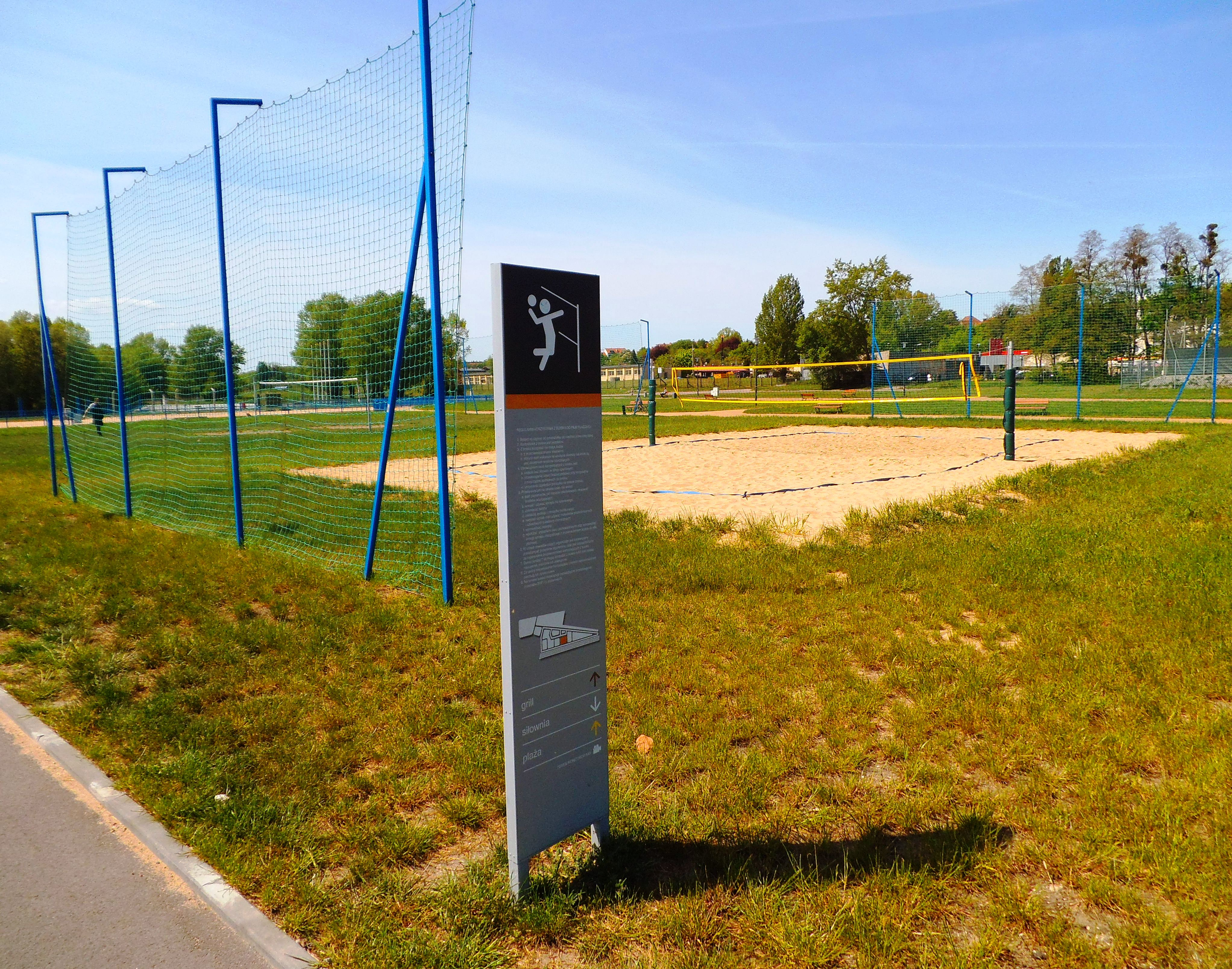 Bulwar Filadelfijski w Toruniu, boisko